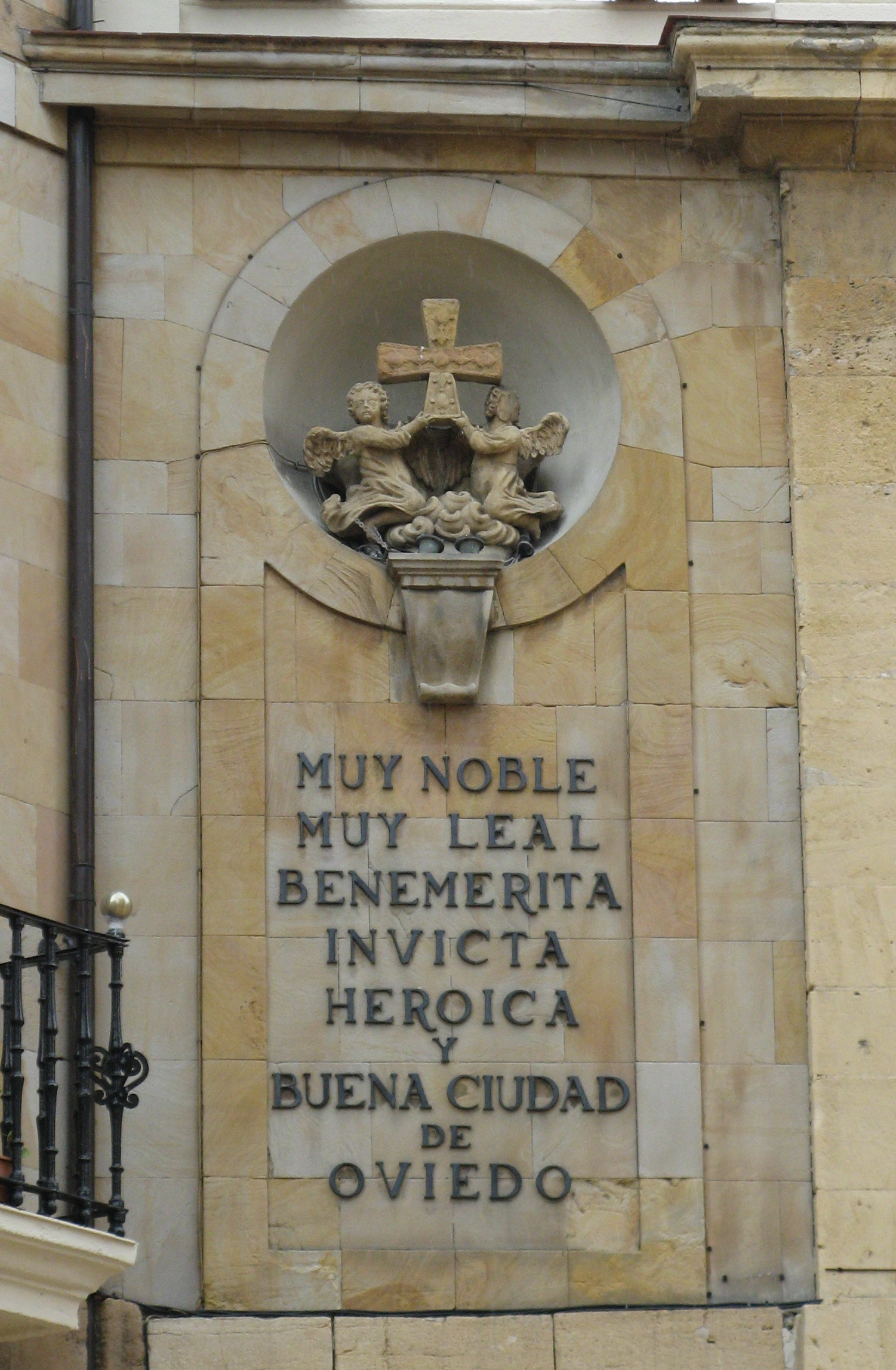 Este texto encontra-se num dos alçados do edifício da Câmara Municipal de Oviedo.